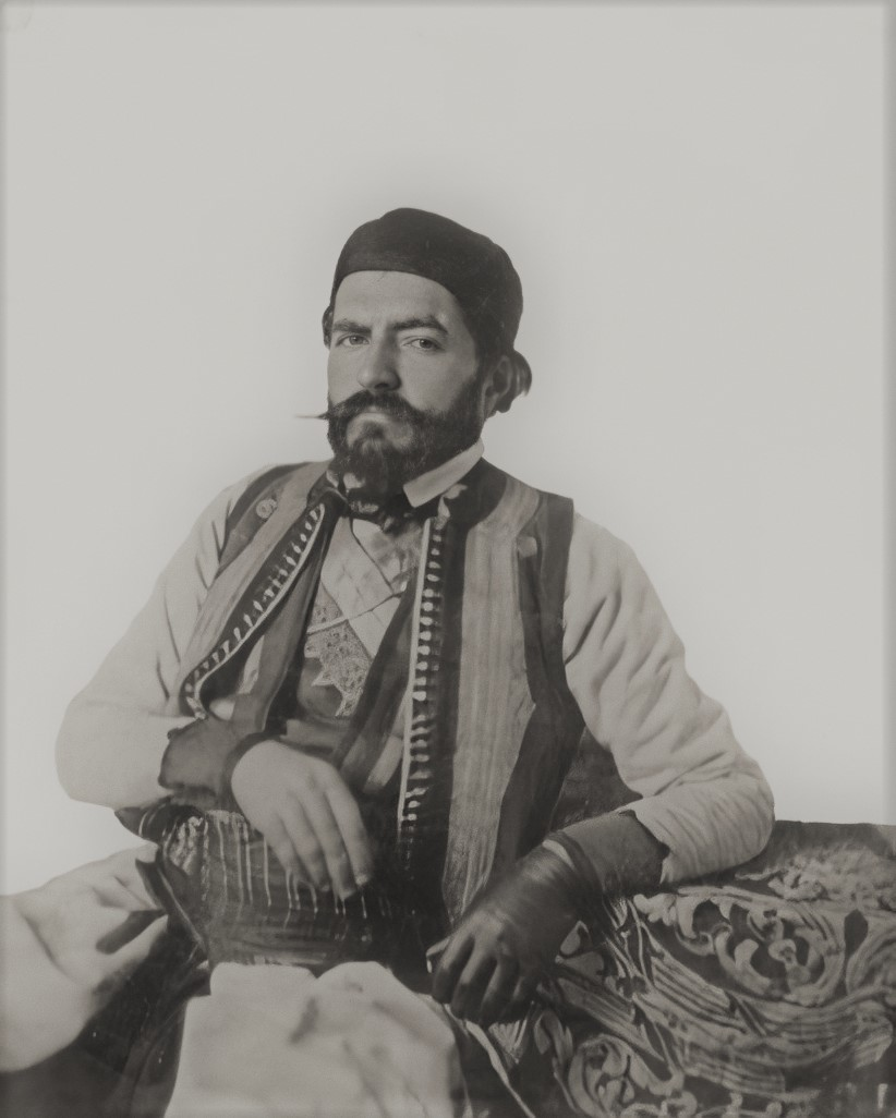 Петар II Петровић Његош , песник и владика (1813-1851). Анастас Јовановић. фотографија. 1851.